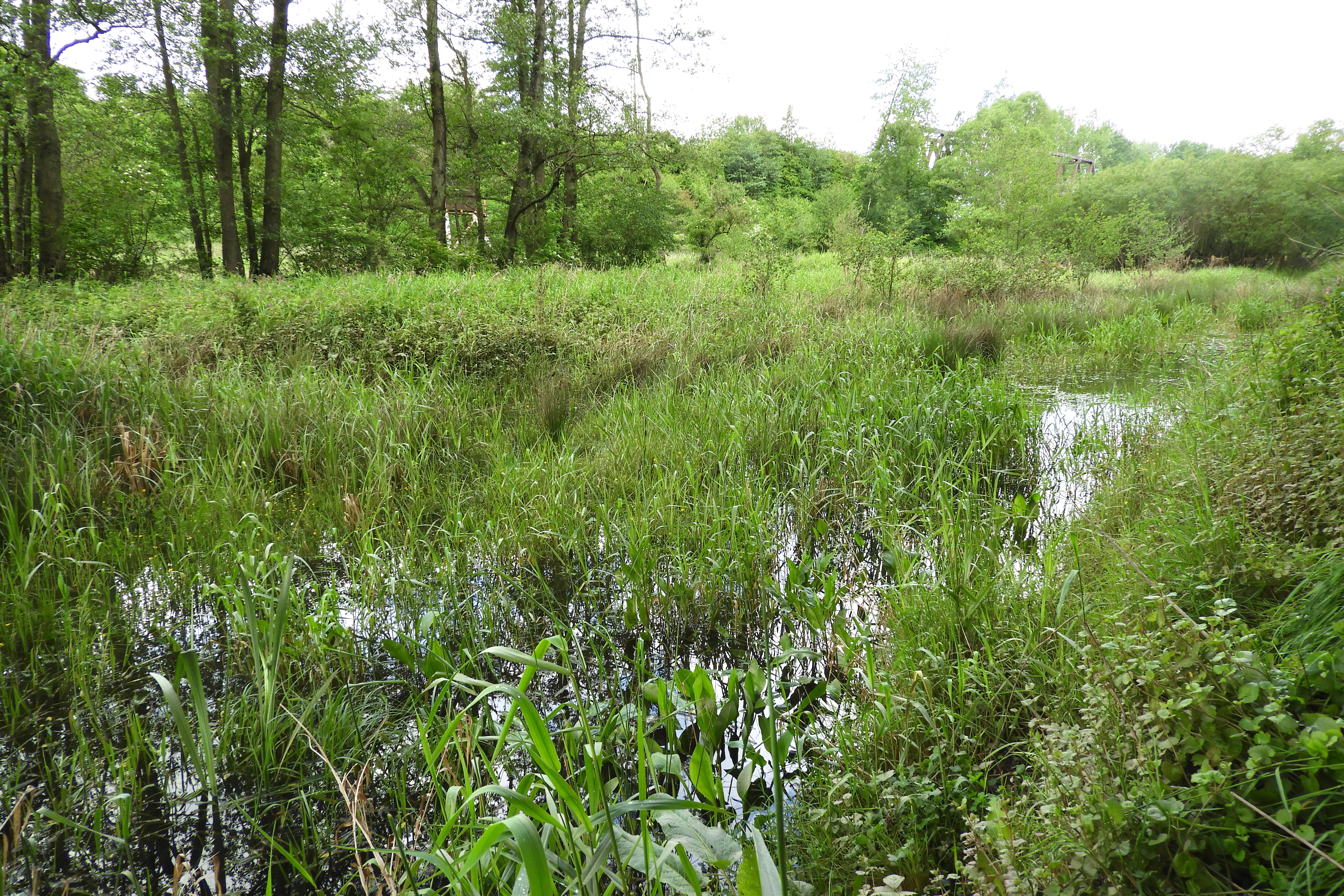 Die „Alte Fulda bei Blankenheim“ ist ein Altwasserbiotop am Mittellauf der Fulda nordöstlich der Gemeinde Blankenheim, einem Stadtteil von Bebra im Landkreis Hersfeld-Rotenburg. Als regional bedeutende Lebensstätte brütender und „Trittstein" für durchziehende Vogelarten ist der im Dezember 1981 zum Naturschutzgebiet erklärte Bereich aus ornithologischer Sicht von großer Bedeutung. Das Naturschutzgebiet liegt vollständig in dem Flora-Fauna-Habitat-Gebiet 5024-305 „Auenwiesen von Fulda, Rohrbach und Solz“, EU-Vogelschutzgebiet 5024-401 „Fuldatal zwischen Rotenburg und Niederaula“ und Landschaftsschutzgebiet „Auenverbund Fulda“. This is a picture of the protected area listed at WDPA under the ID 81266